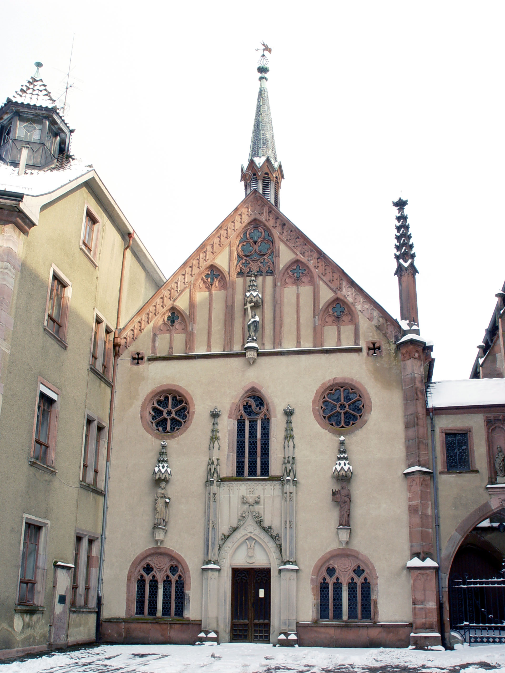 Gemeinfrei, fotographiert von Martin Dürrschnabel Motiv: Fürstenkapelle vom Kloster Lichtenthal. Kamera Sony DSC-F717